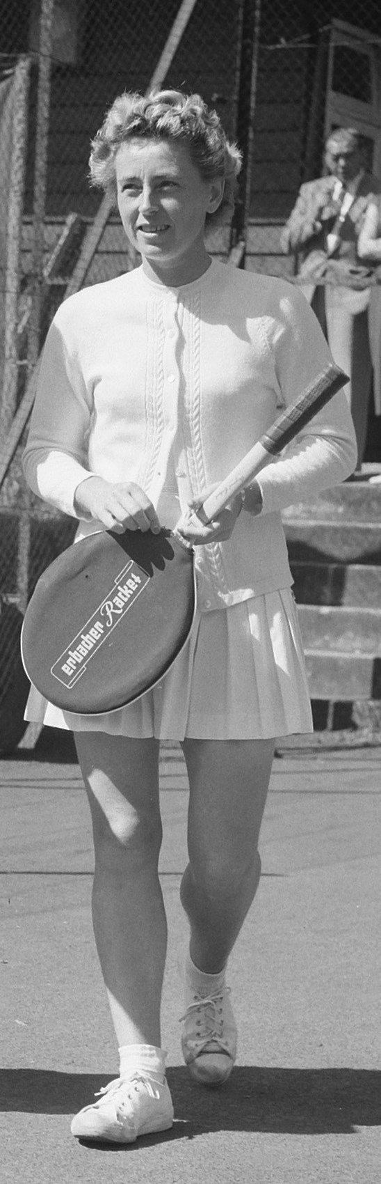 Collectie / Archief : Fotocollectie Anefo Reportage / Serie : [ onbekend ] Beschrijving : Tennis Nederland tegen Duitsland te Venlo, mevr. Rouwenhorst (links) en mevr. J. Pohmann (rechts) Datum : 25 augustus 1957 Locatie : Duitsland, Nederland, Venlo Trefwoorden : TENNIS Fotograaf : Rossem, Wim van / Anefo Auteursrechthebbende : Nationaal Archief Materiaalsoort : Negatief (zwart/wit) Nummer archiefinventaris : bekijk toegang 2.24.01.04 Bestanddeelnummer : 908-8915